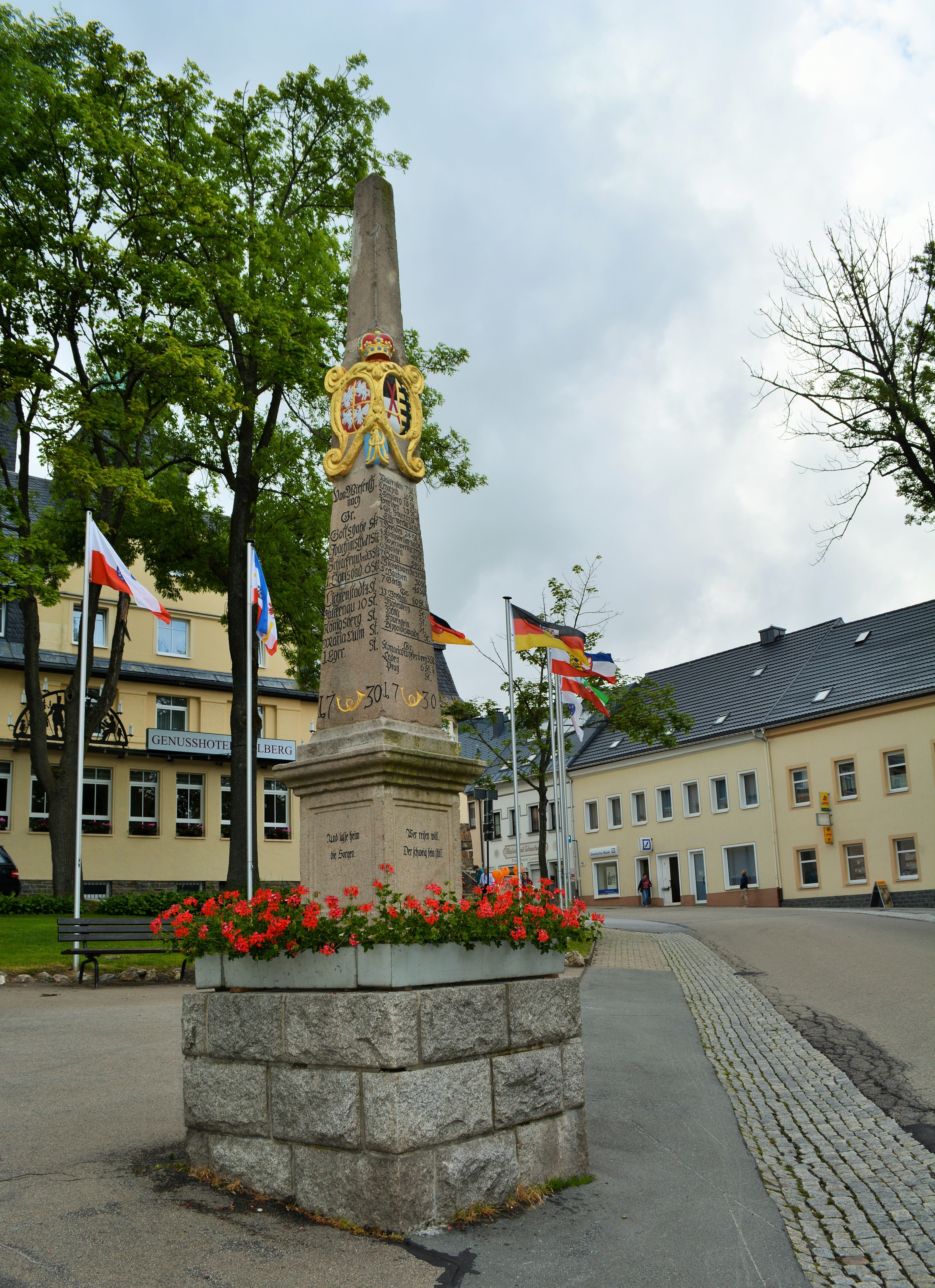 Kursächsische Distanzsäule von 1730 auf dem Markt von Oberwiesenthal